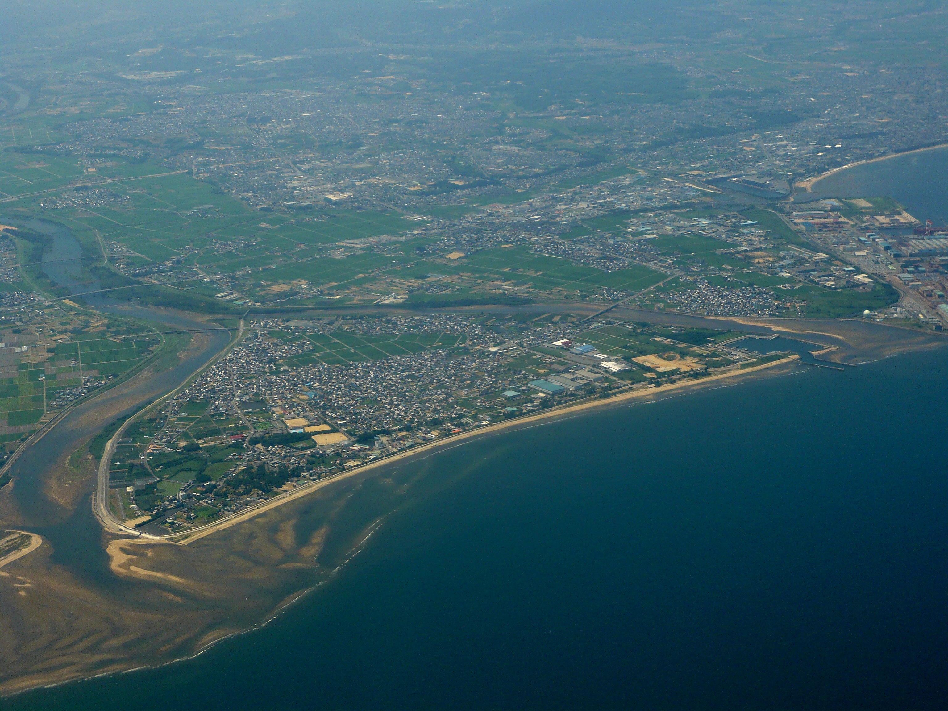 三重県津市香良洲町。機上より撮影